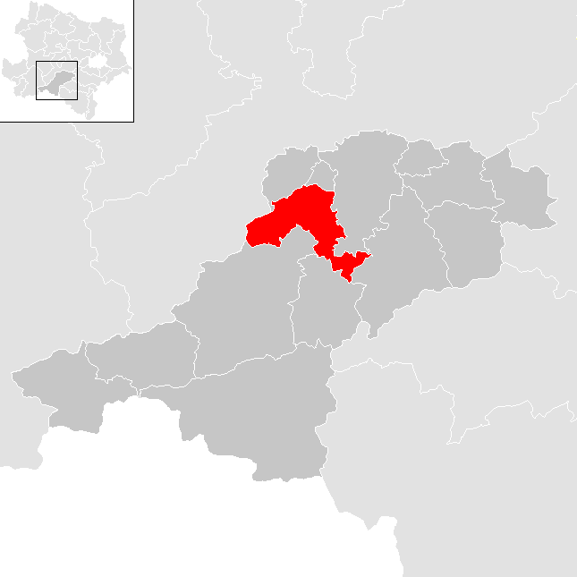 Bezirk Lilienfeld